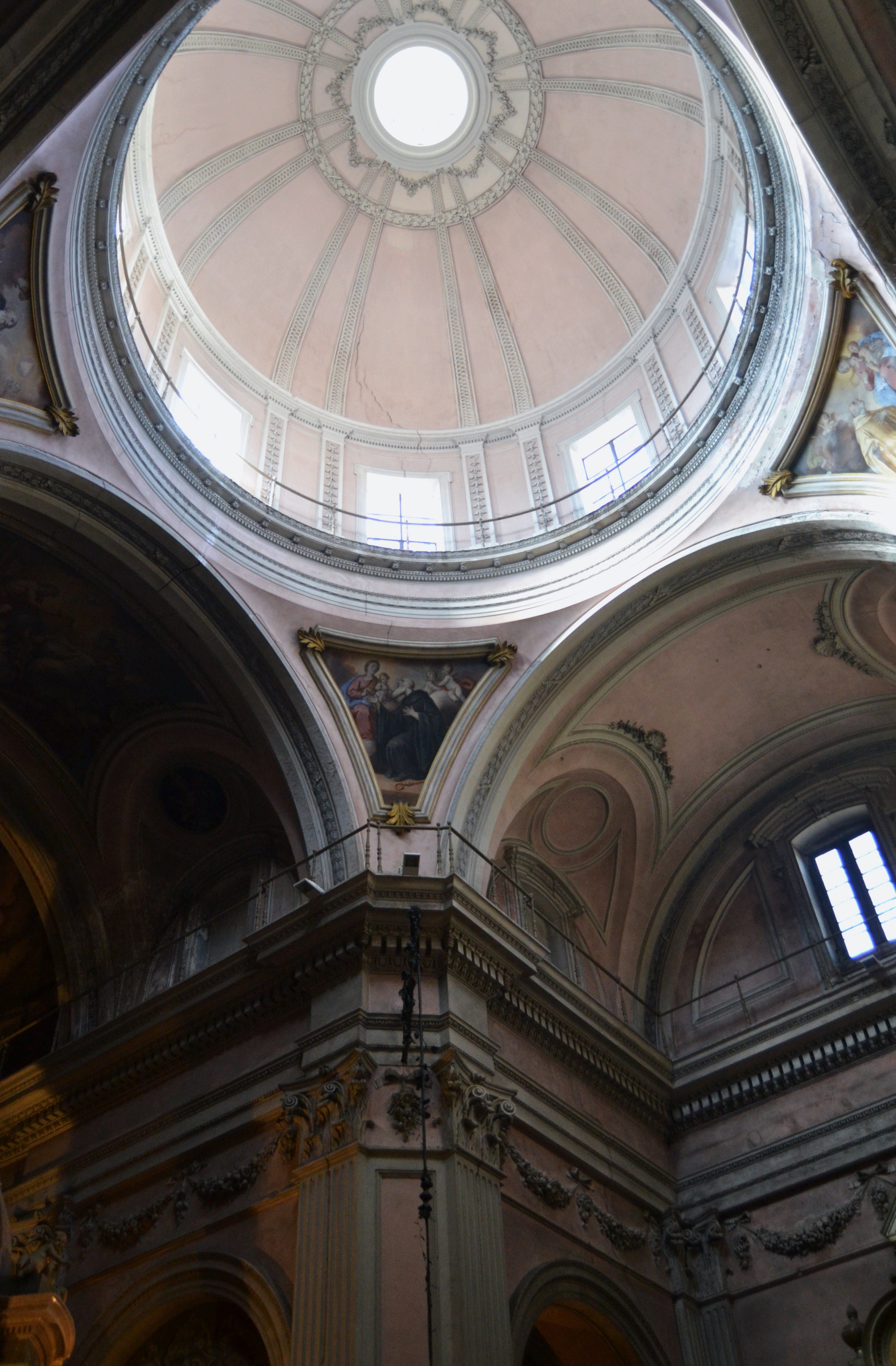 Cúpula, interior, de l'església del Temple de València.